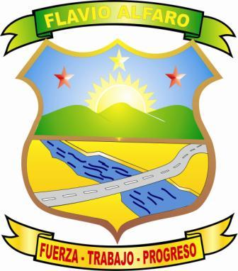 escudo de flavio alfaro